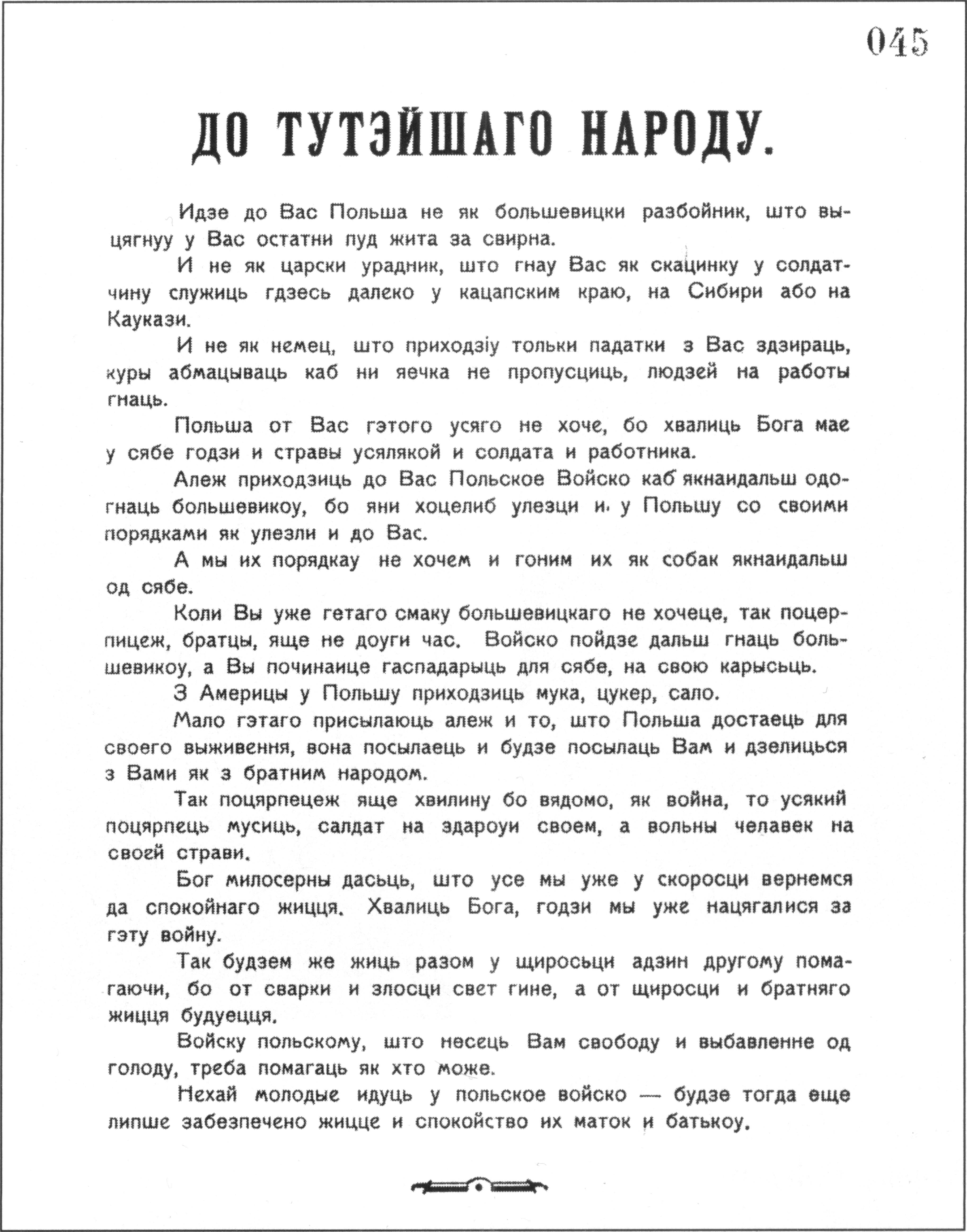 Polska ulotka "Do tutejszaho narodu" (Do tutejszej ludności) w czasie wojny polsko-sowieckiej 1920.